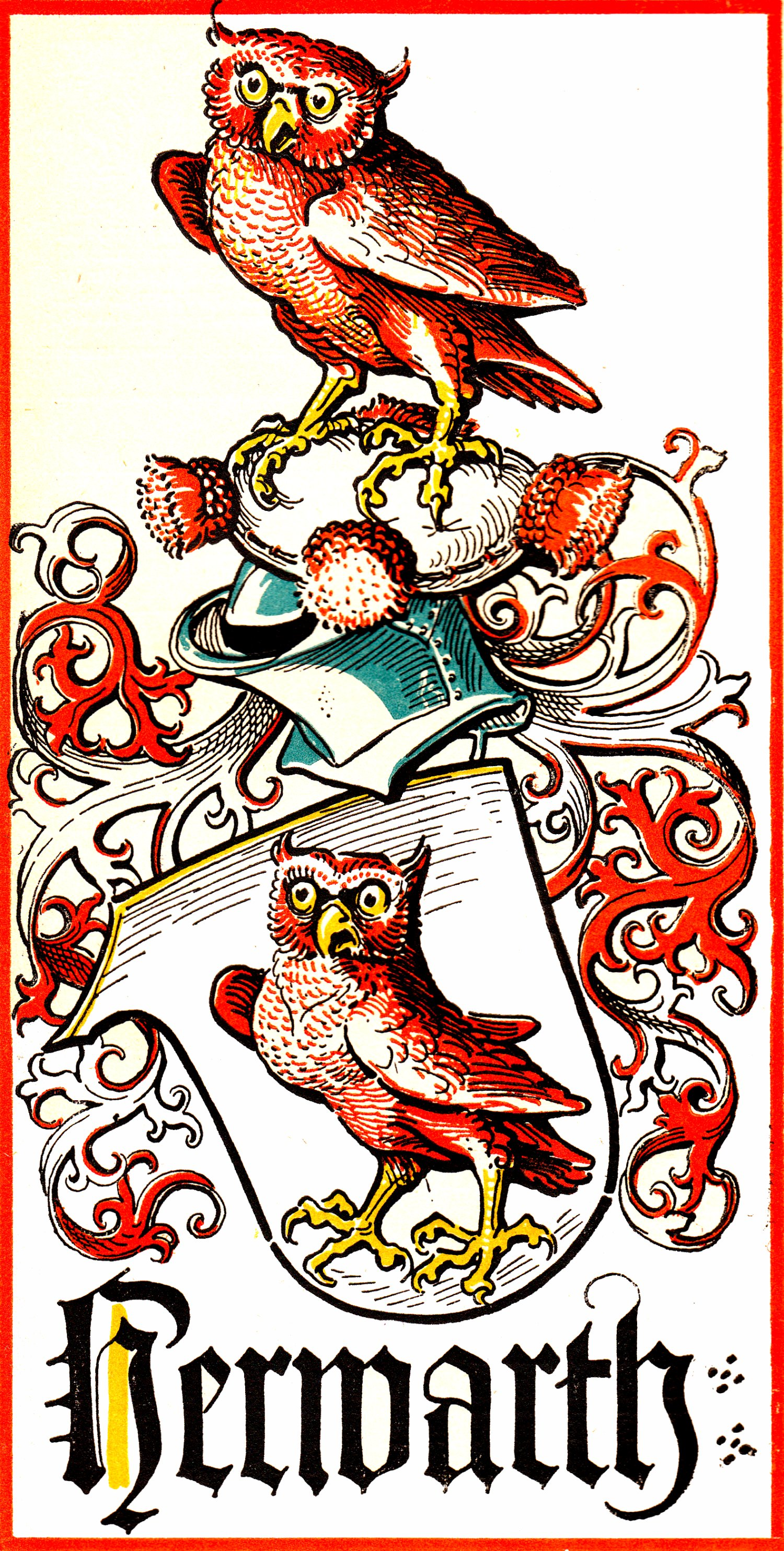 Wappen derer von Herwarth